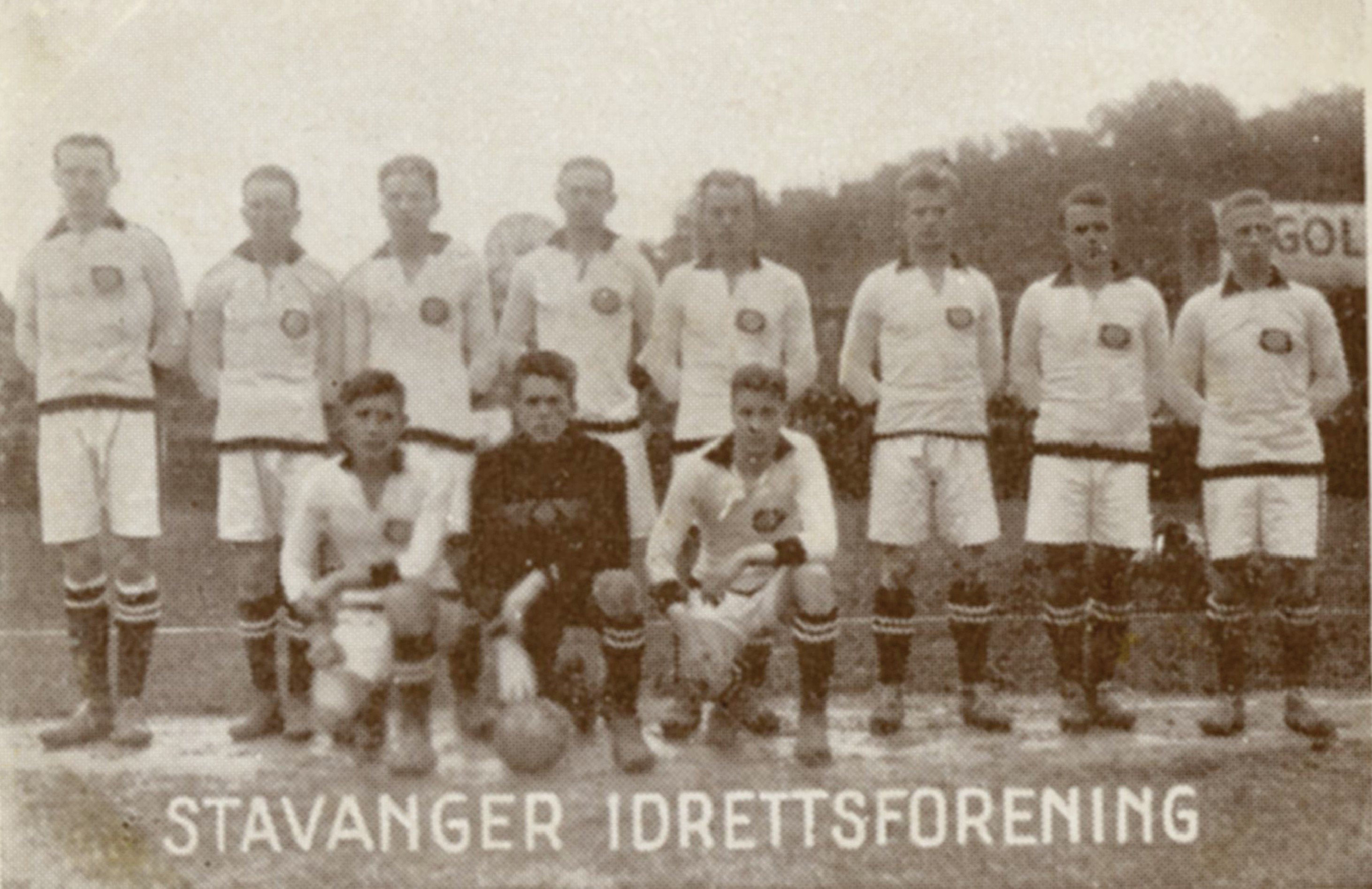 Format: Samlekort Dato / Date: ca. 1930 (dokumentet) Fotograf / Photographer: Ukjent Wikipedia: Stavanger Idrettsforening Eier / Owner Institution: Trondheim byarkiv, The Municipal Archives of Trondheim Arkivreferanse / Archive reference: Sportsklubben Freidig: Sigarettfoto ca. 1930 (Løpenr. 75) F23975 Tekst på baksiden: Stavanger Idrettsforening er et utmerket fotballag som spilte i semifinalen 1929 mot "Ørn", Horten. På laget spiller den eminente fotballspiller Berg-Johansen, som har deltatt flere ganger på det norske landslag og høstet stor anerkjennelse for sitt utmerkede spill. Merknad: Disse samlekortene med bilder av norske og internasjonale idretthelter fulgte med i sigarettpakker på 1920 og 30-tallet - derav tobakksreklamen på baksiden. Samlekortene kommer fra Sportsklubben Freidigs arkiv, og inneholder nærmere 90 unike kort pent plassert i et samlealbum. Samleren var den senere skipsmegler Finn Følling (1914 – 1985).